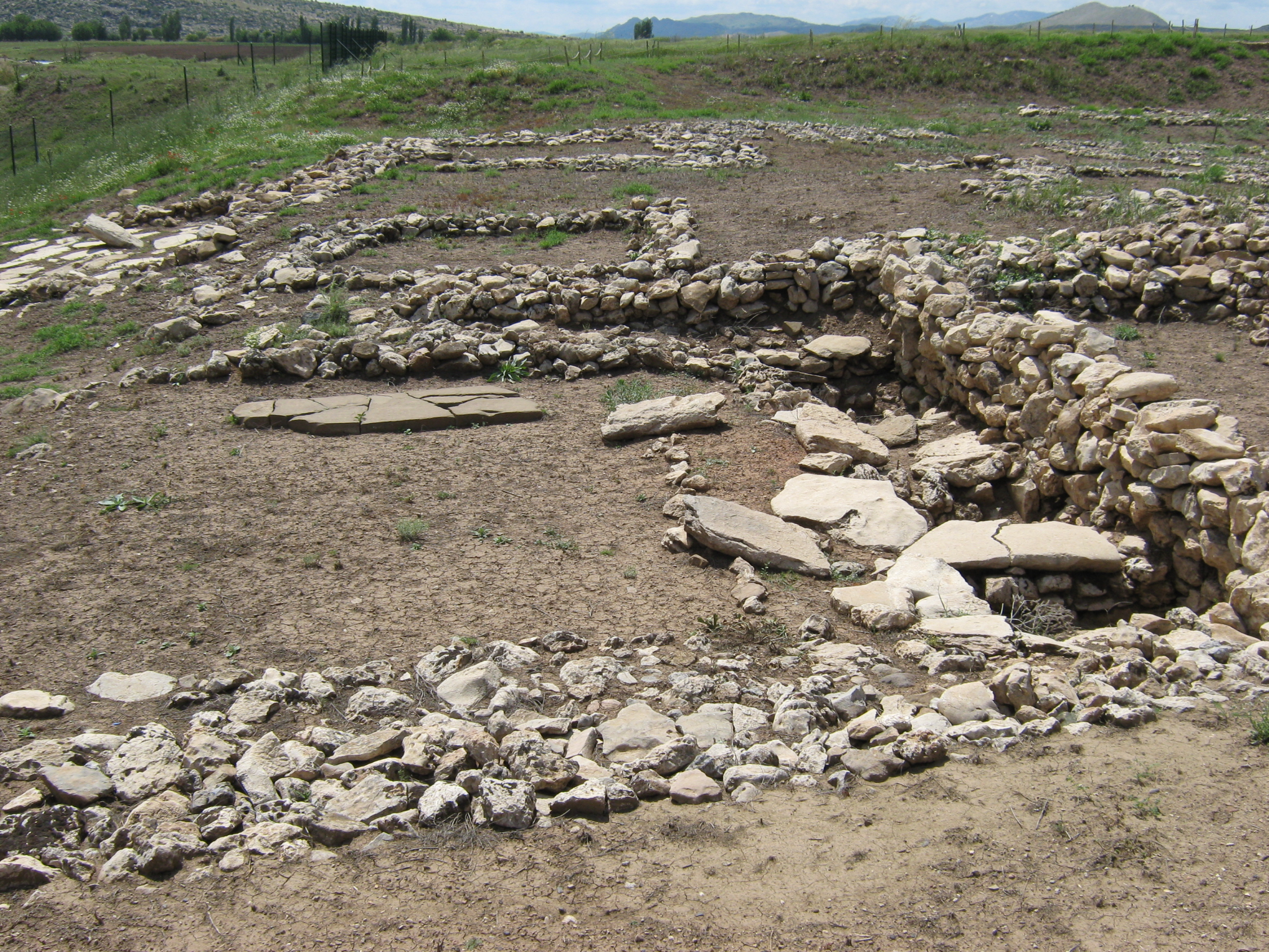 so genanntes skull-building von Cayönü